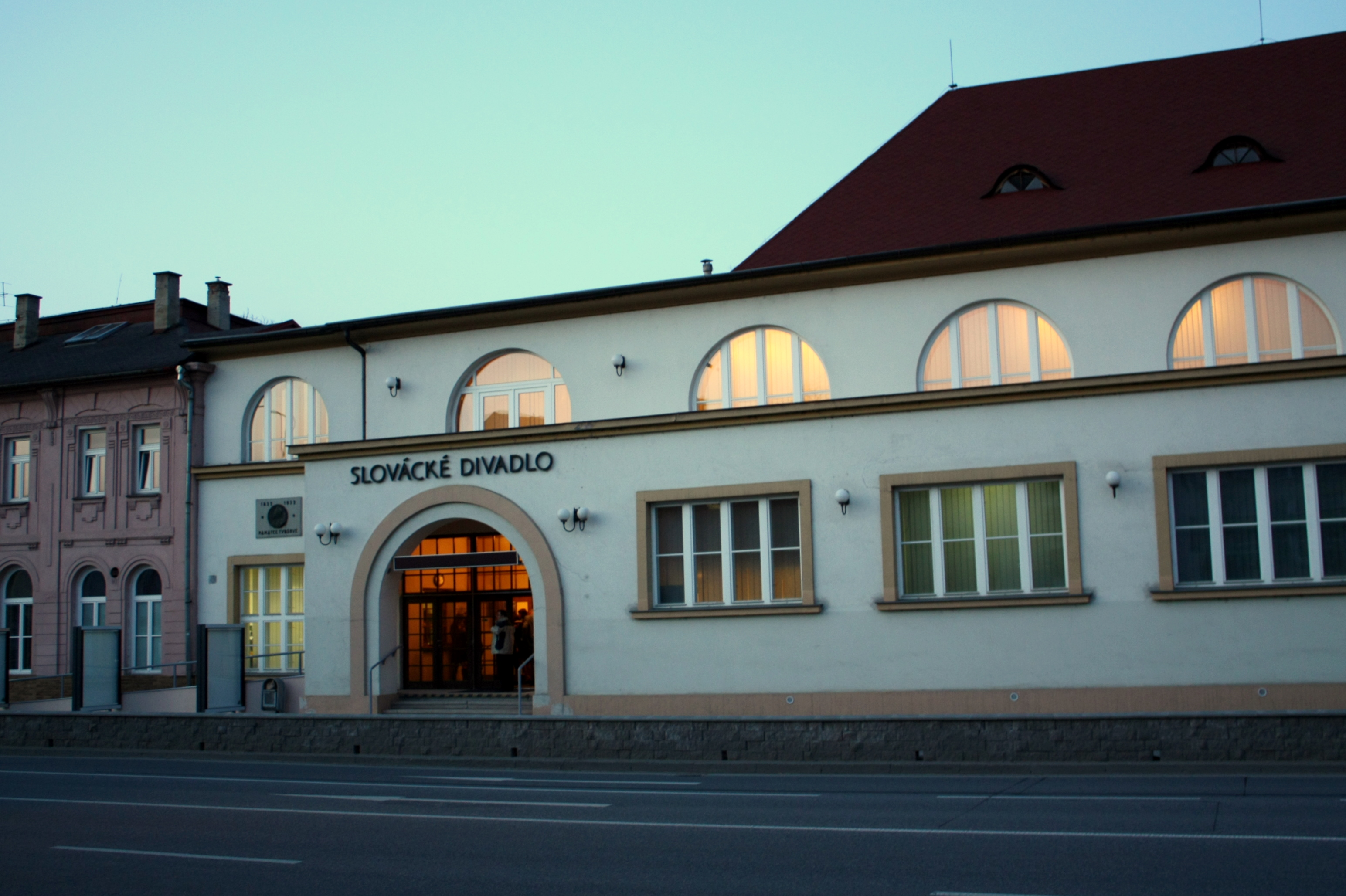 Slovácké divadlo v Uherském Hradišti, dnešní sídlo v bývalé budově sokolovny